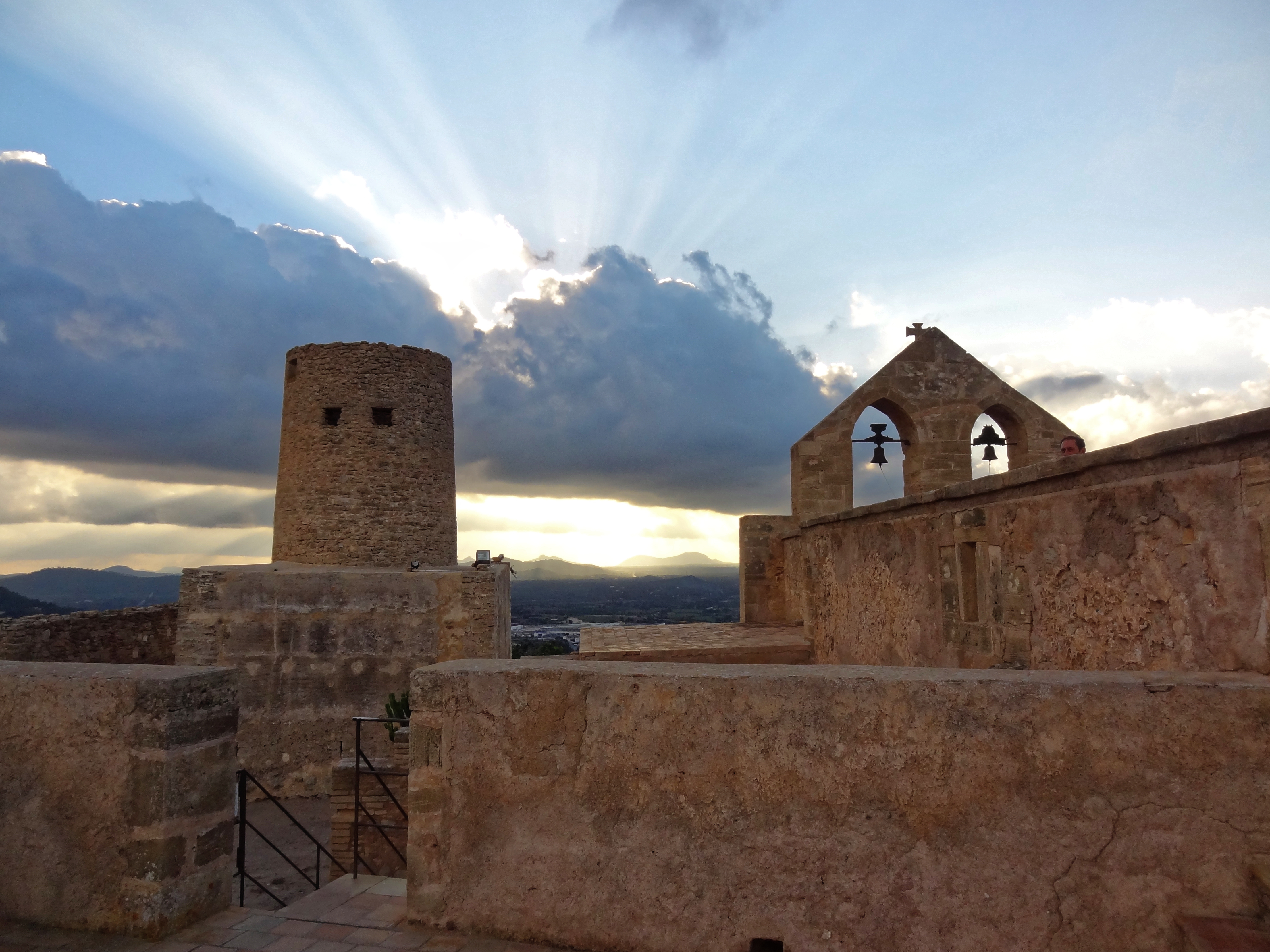 Castell de Capdepera, Mallorca